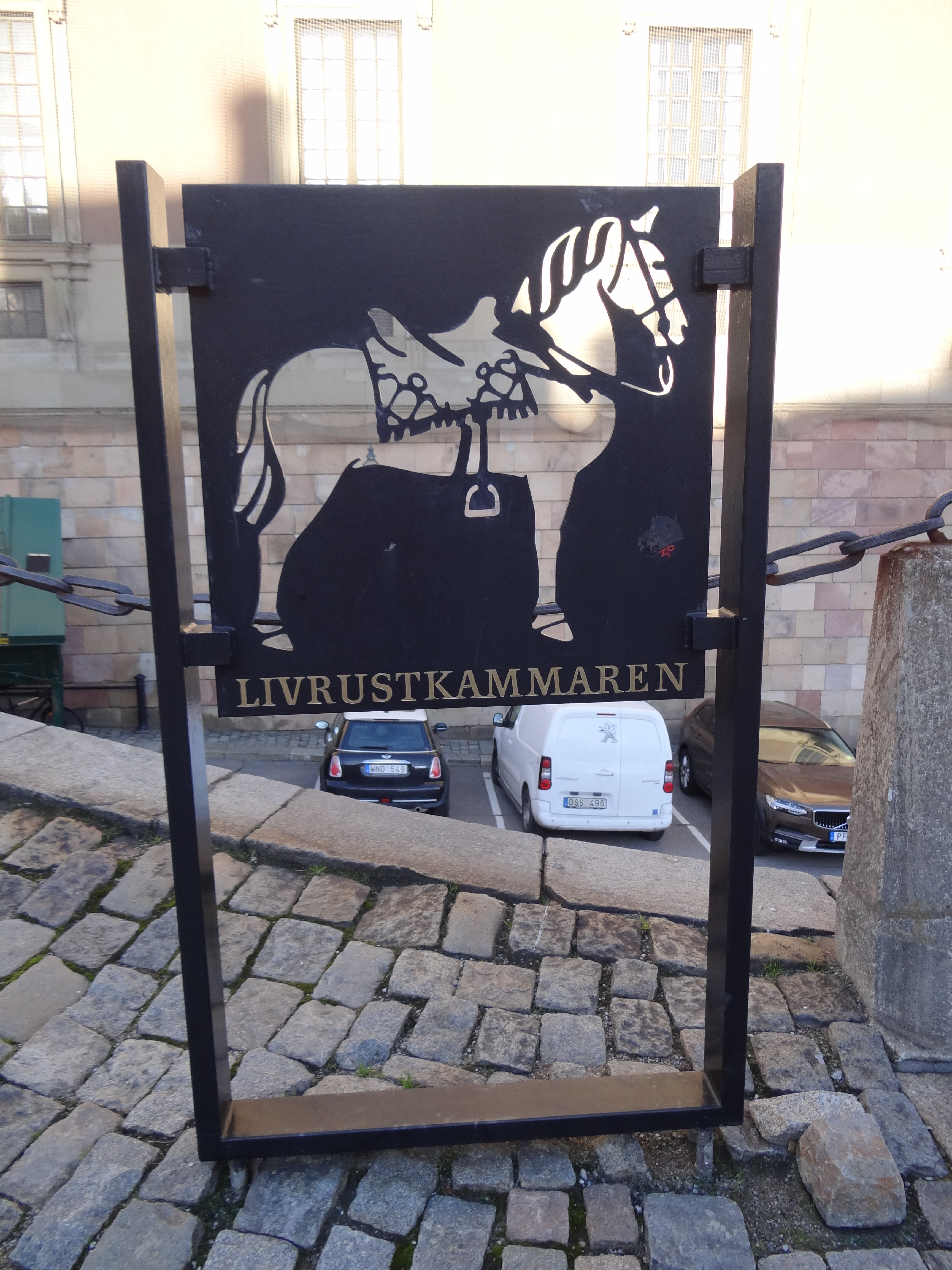 הכניסה למוזיאון ארמורי המלכותי שהוא מוזיאון להיסטוריה הצבאית והמלכותית של שוודיה המוזיאון הראשון שהוקם בשוודיה שלט הסוס המצביע על המוזיאון המשמש כלוגו של המוזיאון